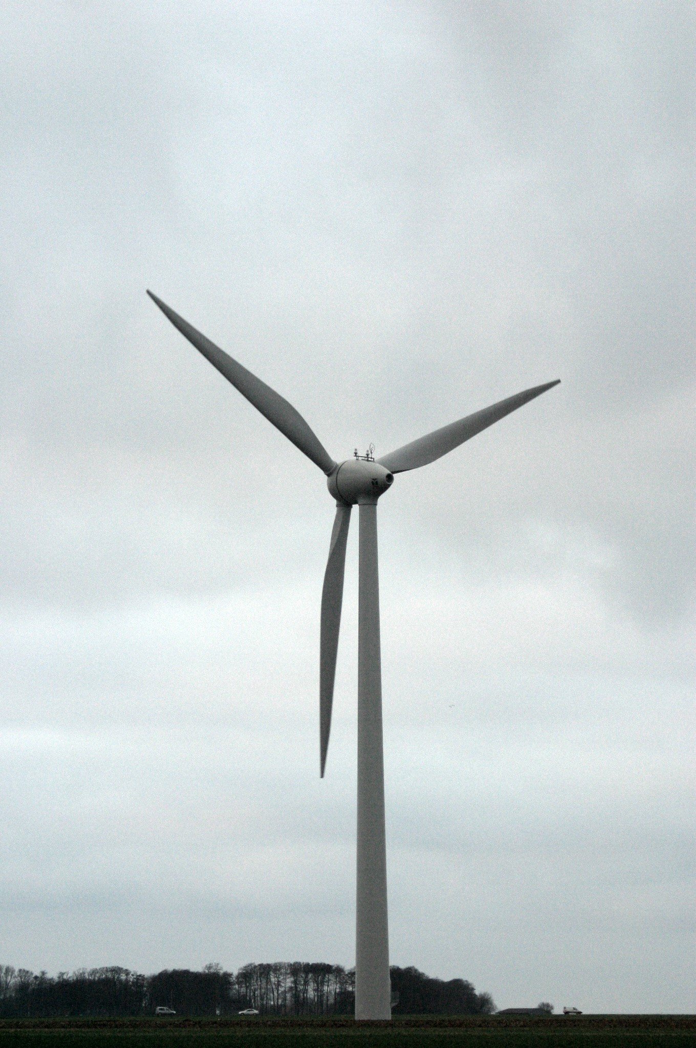 2olienne_E66_vue_ensemble